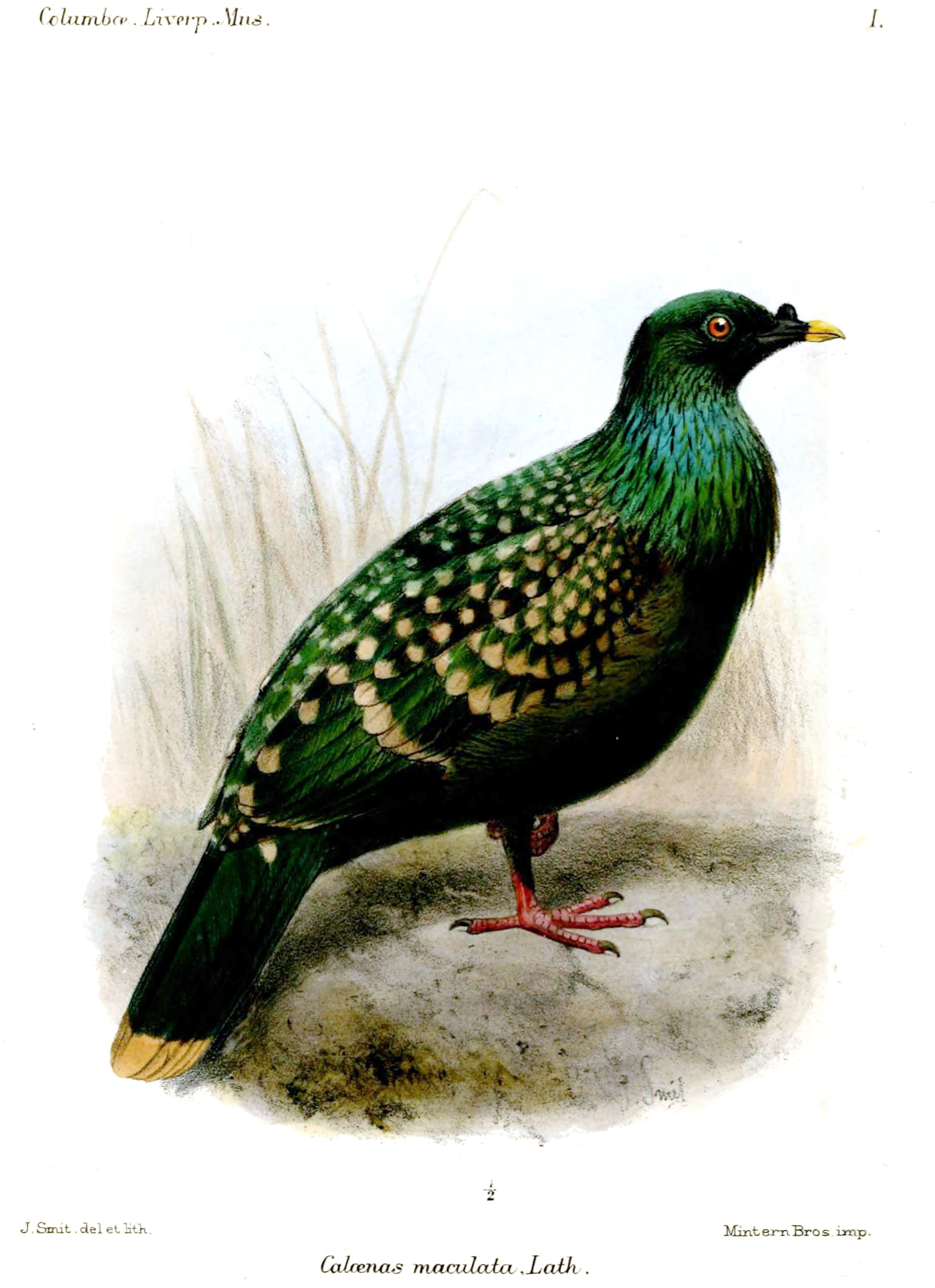 Caloenas maculata ("Liverpool Pigeon")